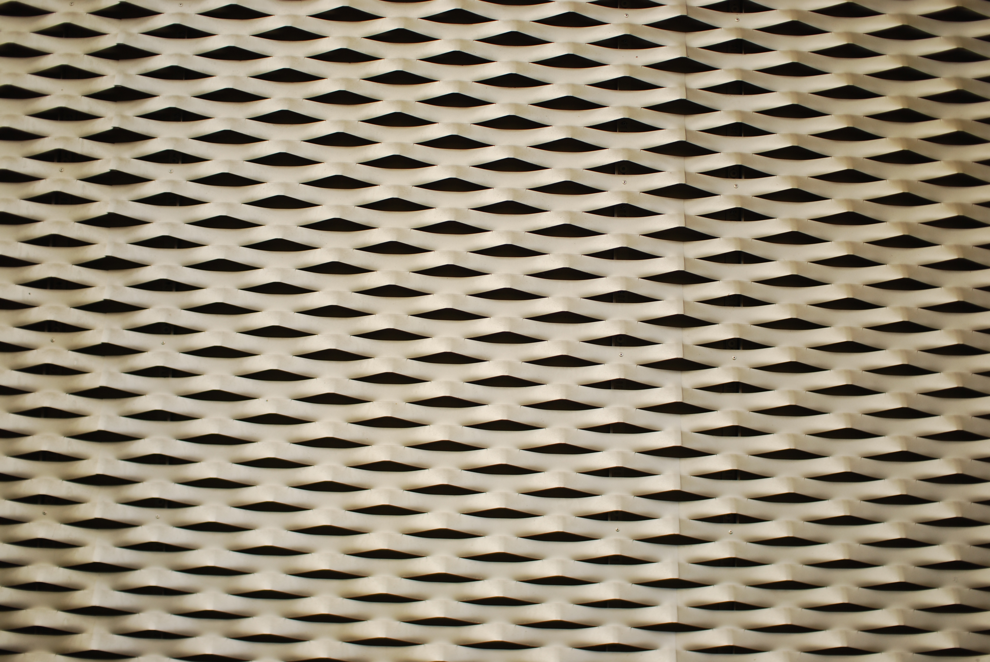 BIBLIOTEKET